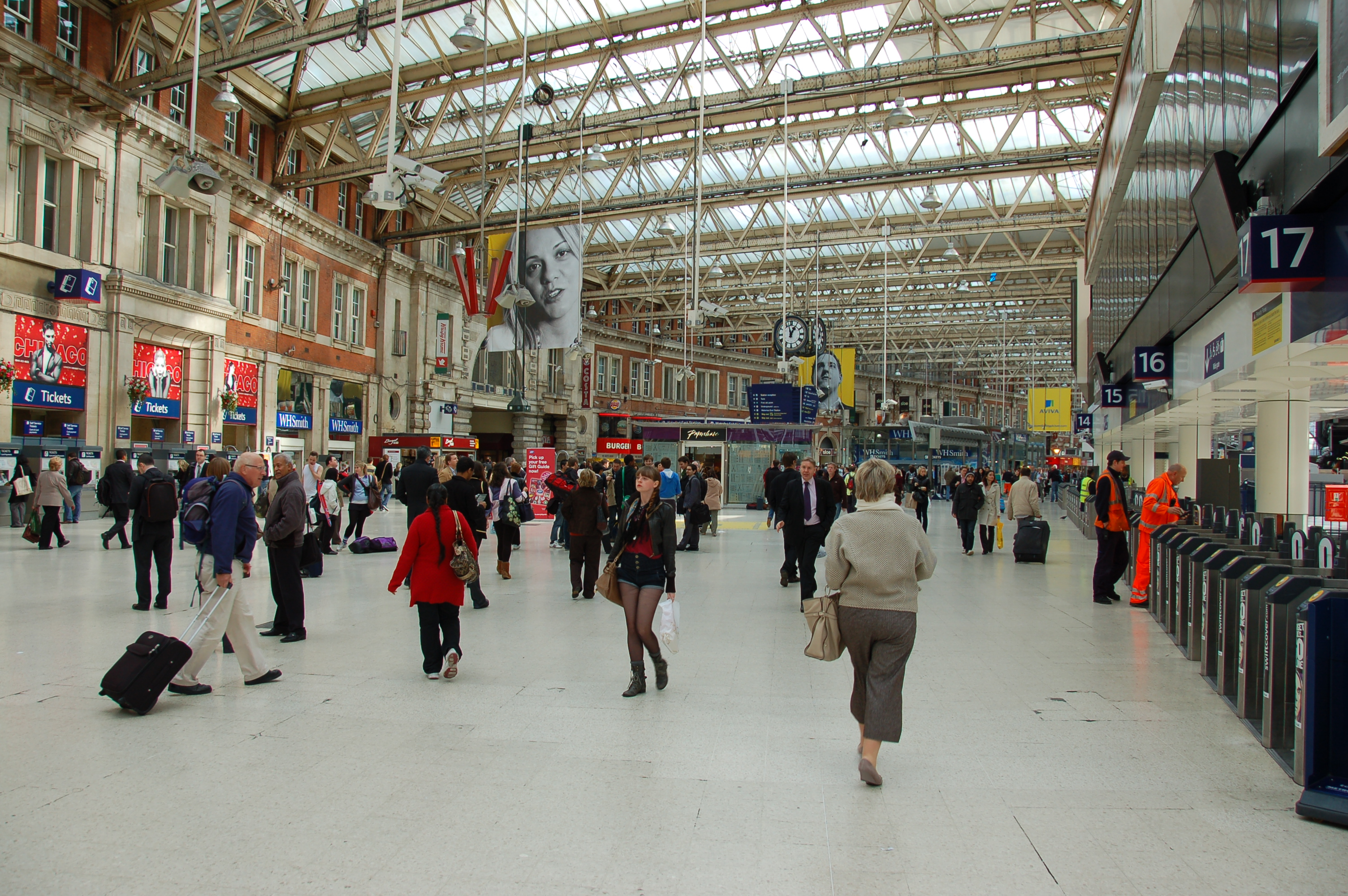 London